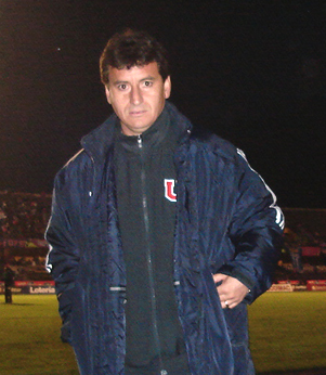 Pedro González, futbolista chileno. Fotografía tomada el día de su despedida.